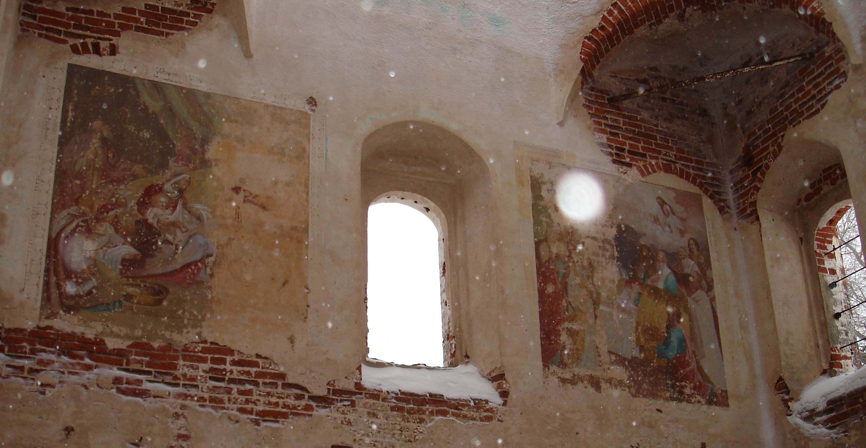 Древние фрески Красногорского монастыря